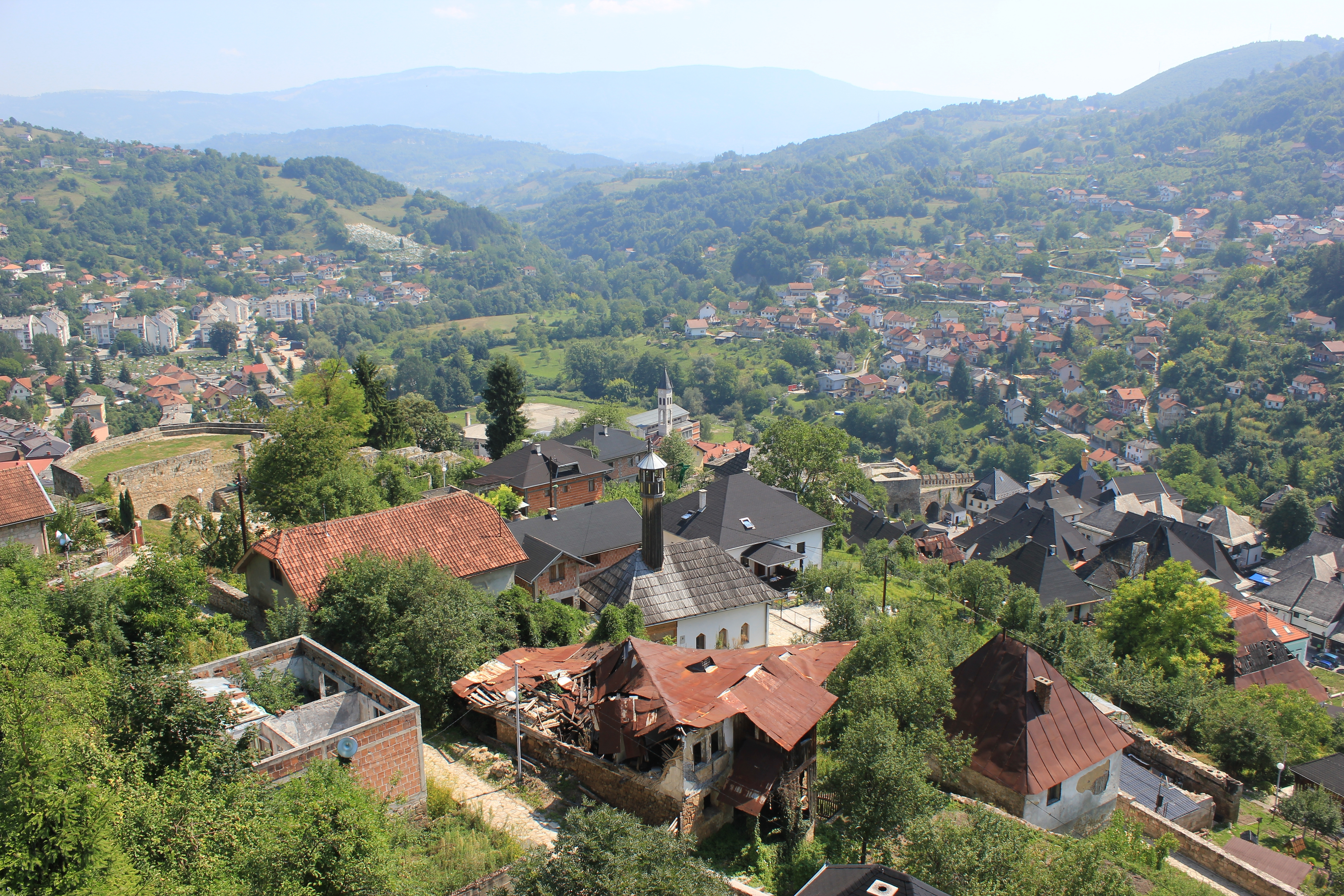 Blick von der Festung auf Jajce